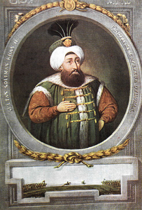 Süleyman II